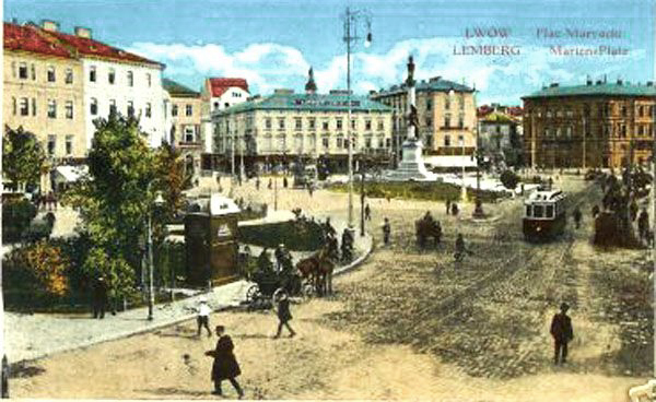 Львів, Пл. Марійська 1915